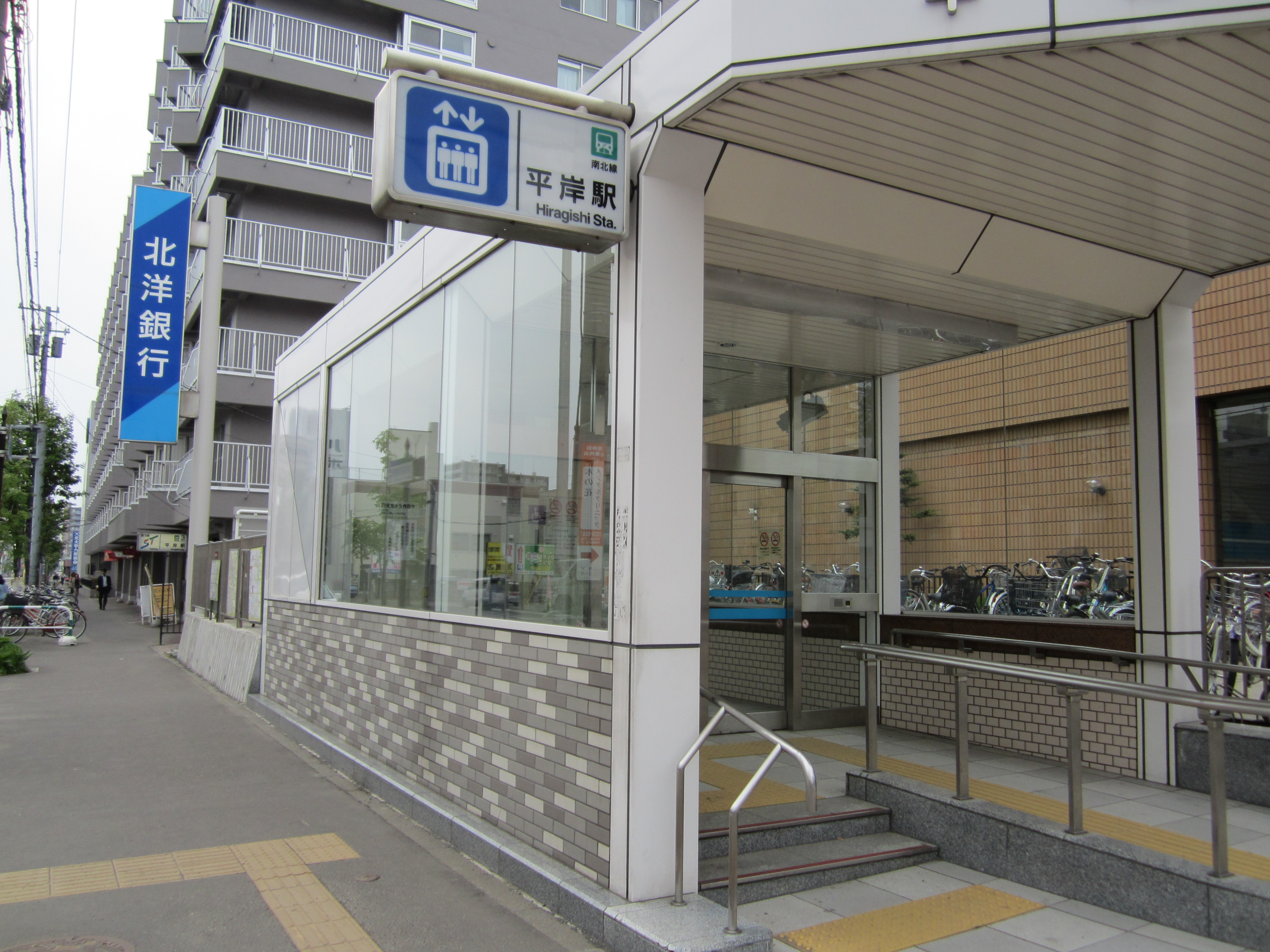 札幌市営地下鉄南北線平岸駅（麻生方面エレベータ、奥は階段の出入口）